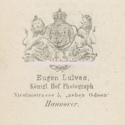 Rückseite einer Carte-de-visite-Fotografie von Eugen Lulves. Das Bild zeigt eine unbekannte Frau mit Hut und die Bildunterschrift "E. Lulves Hof. Phot."